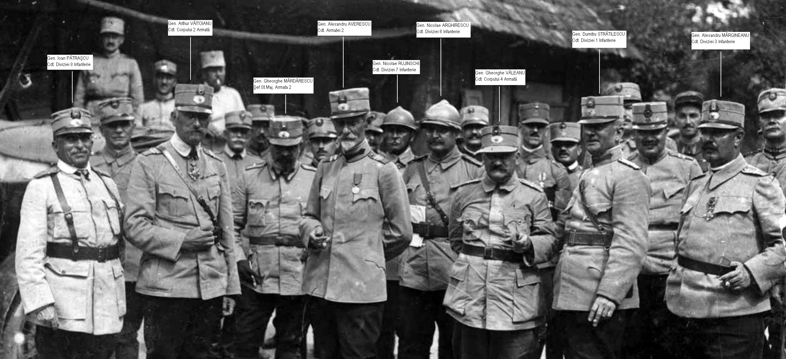 Generalii din Armata 2 română. În fotografie apar generalii: Alexandru Averescu, Gheorghe Mărdărescu, Arthur Văitoianu, Gheorghe Văleanu, Ioan Pătraşcu, Nicolae Rujinschi, Nicolae Arghirescu, Dumitru Strătilescu şi Alexandru Mărgineanu